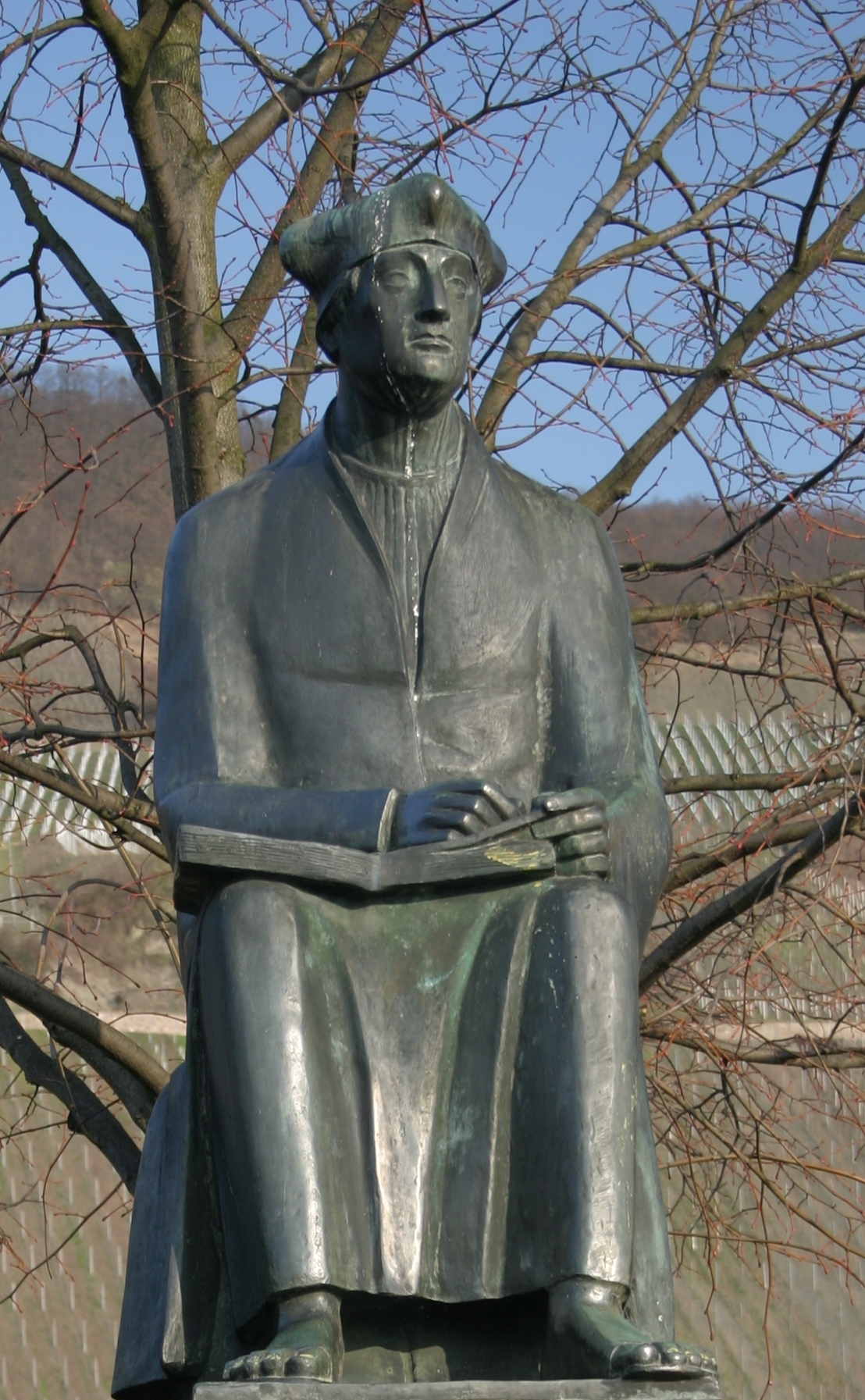 Sculptur vum Johannes Trithemius zu Trittenheim op der Bréck.